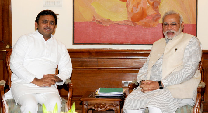 Uttar Pradesh CM meets PM Narendra Modi